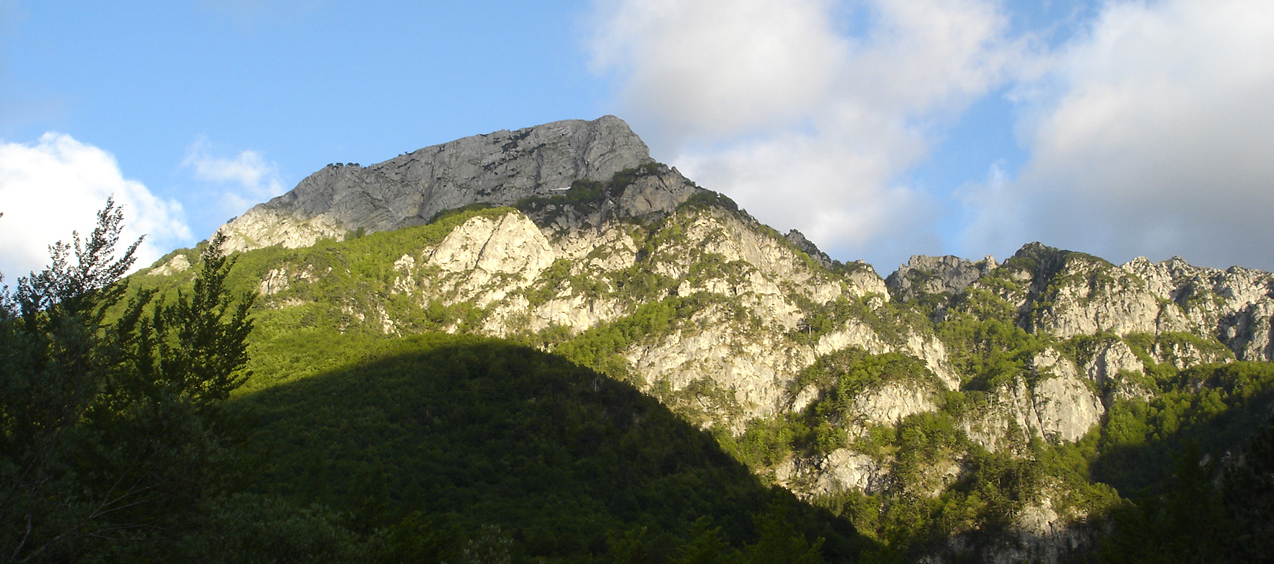 Monte Sterpi d'Alto dalla Camosciara nel Parco Nazionale d'Abruzzo